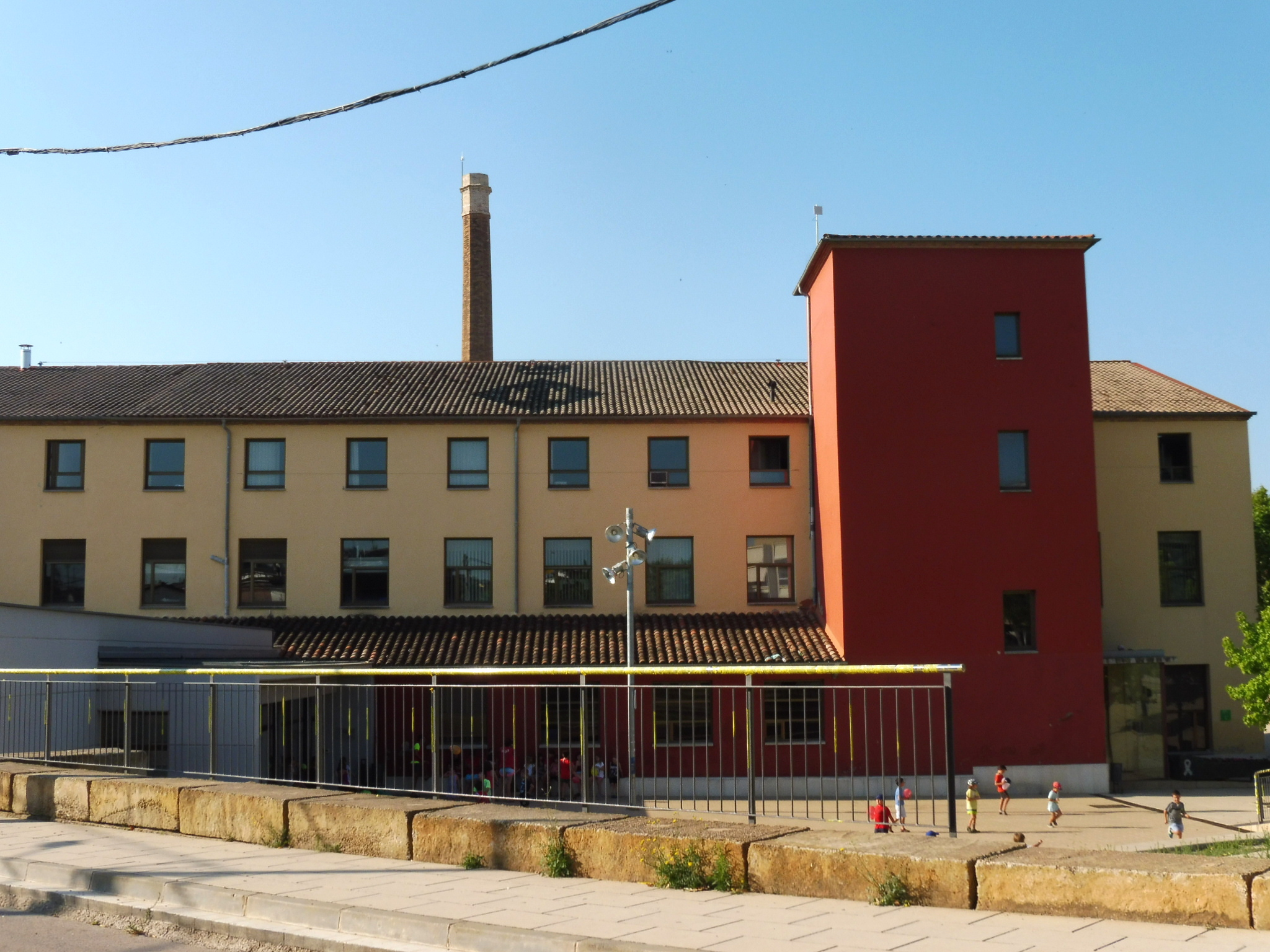 Antiga Fàbrica de Gallifa (Sant Joan de Vilatorrada): façana nord